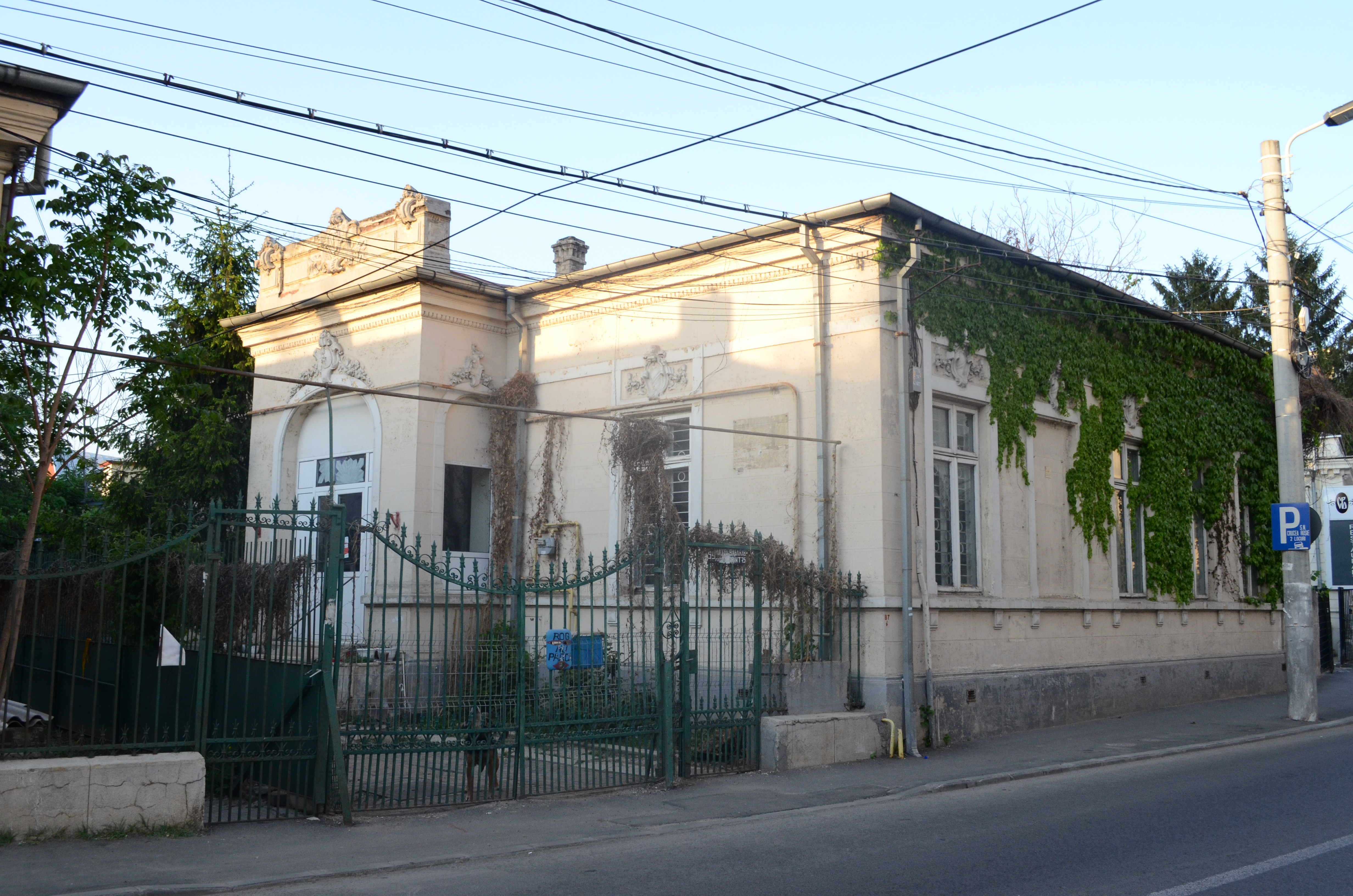 Casă, Strada Matei Basarab nr. 59, Sector 3, București